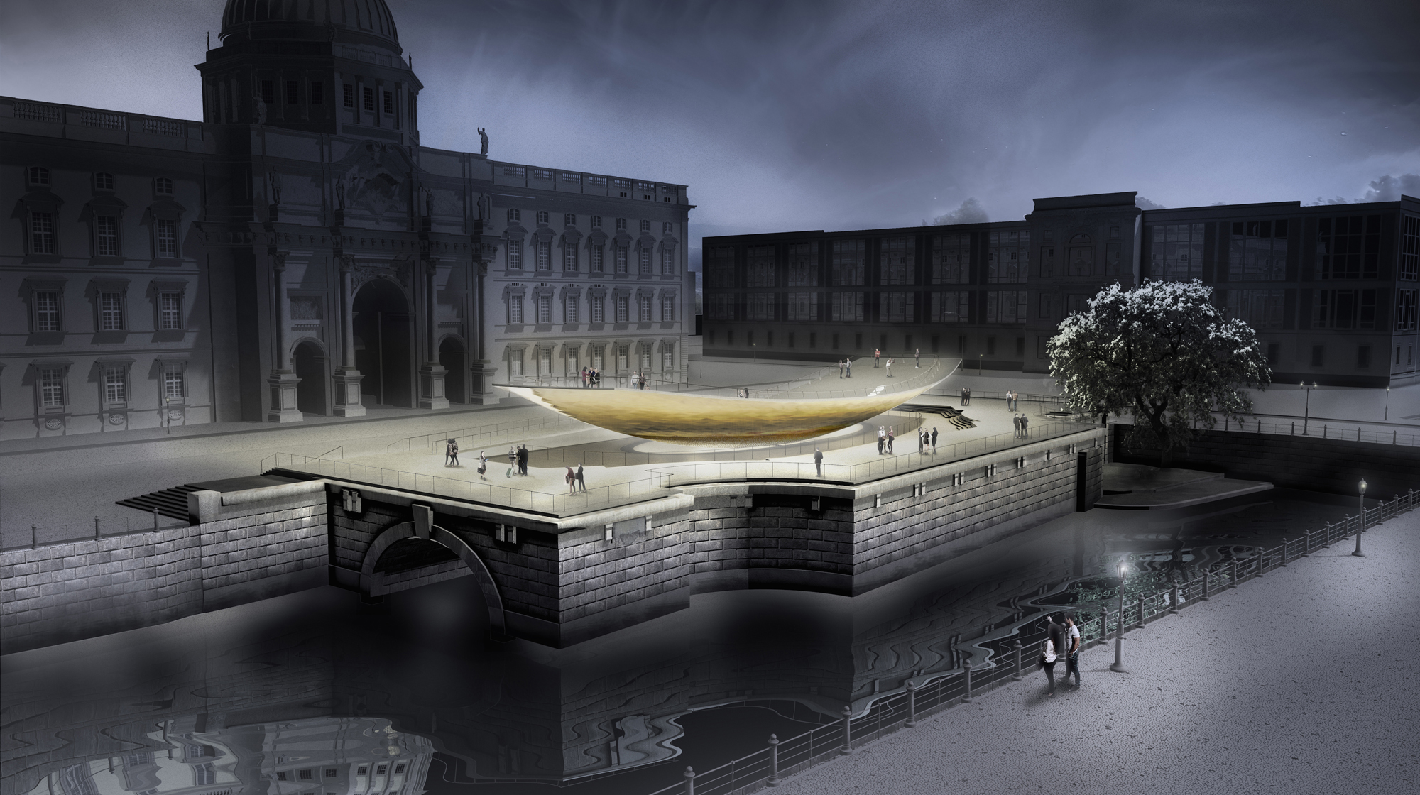 Überarbeiteter Entwurf Stand Herbst 2014: Nachtansicht vom Schinkelplatz aus betrachtet.